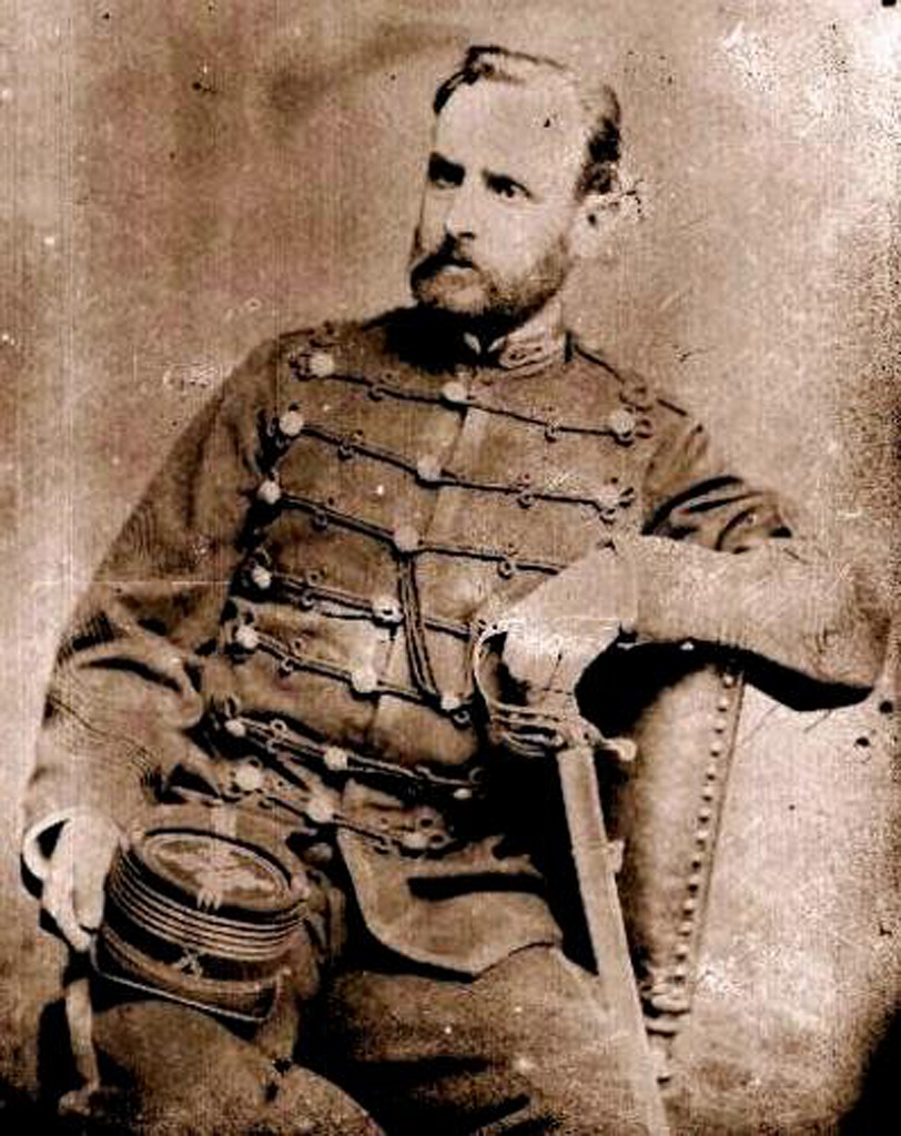 José Miguel Alcérreca Saldes (Santiago 7 de mayo de 1845- Placilla, cerca de Valparaíso, 28 de agosto de 1891). Militar chileno. Participo en la Guerra del Pacífico y en la Guerra Civil de 1891